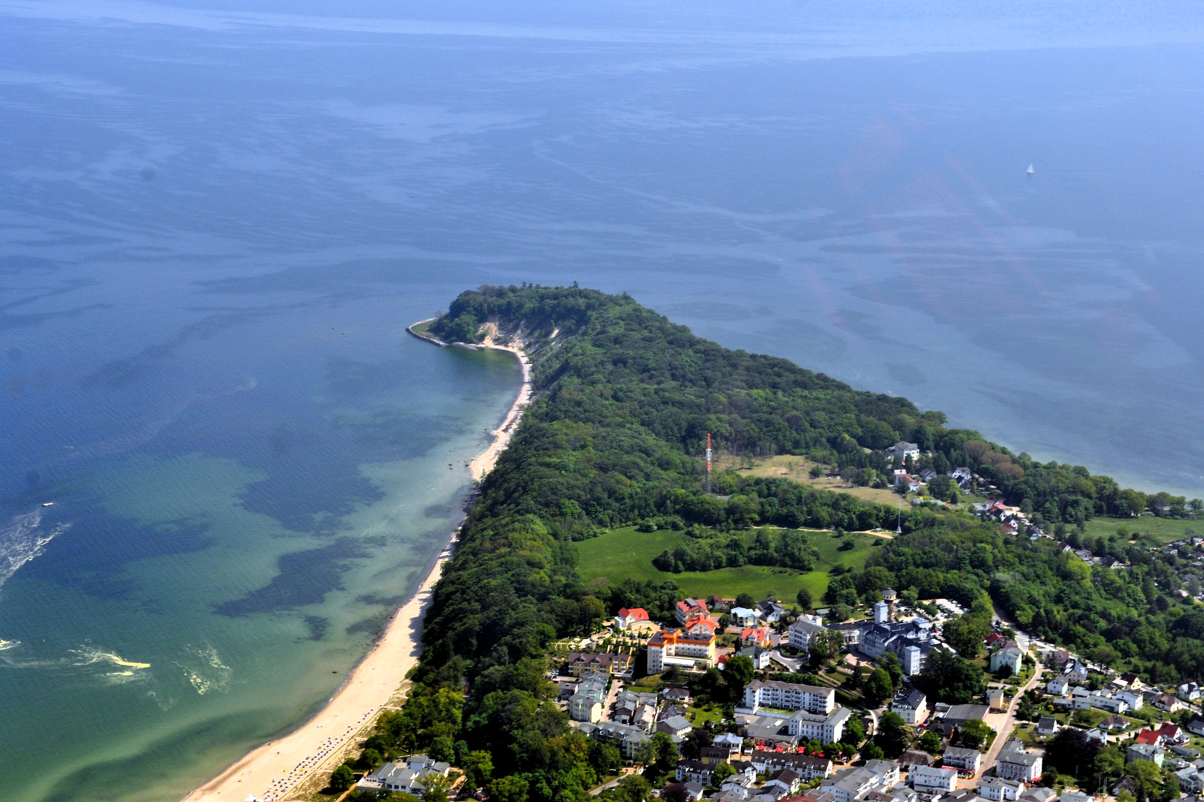 Die Bilder wurden von mir während eines einstündigen Rundflugs ab Flugplatz Güttin am 21. Mai 2011 aufgenommen. Die Bildbeschreibung steht im Dateinamen. Aufgenommen mit einer Nikon D5000 durch das Seitenfenster des Flugzeugs.